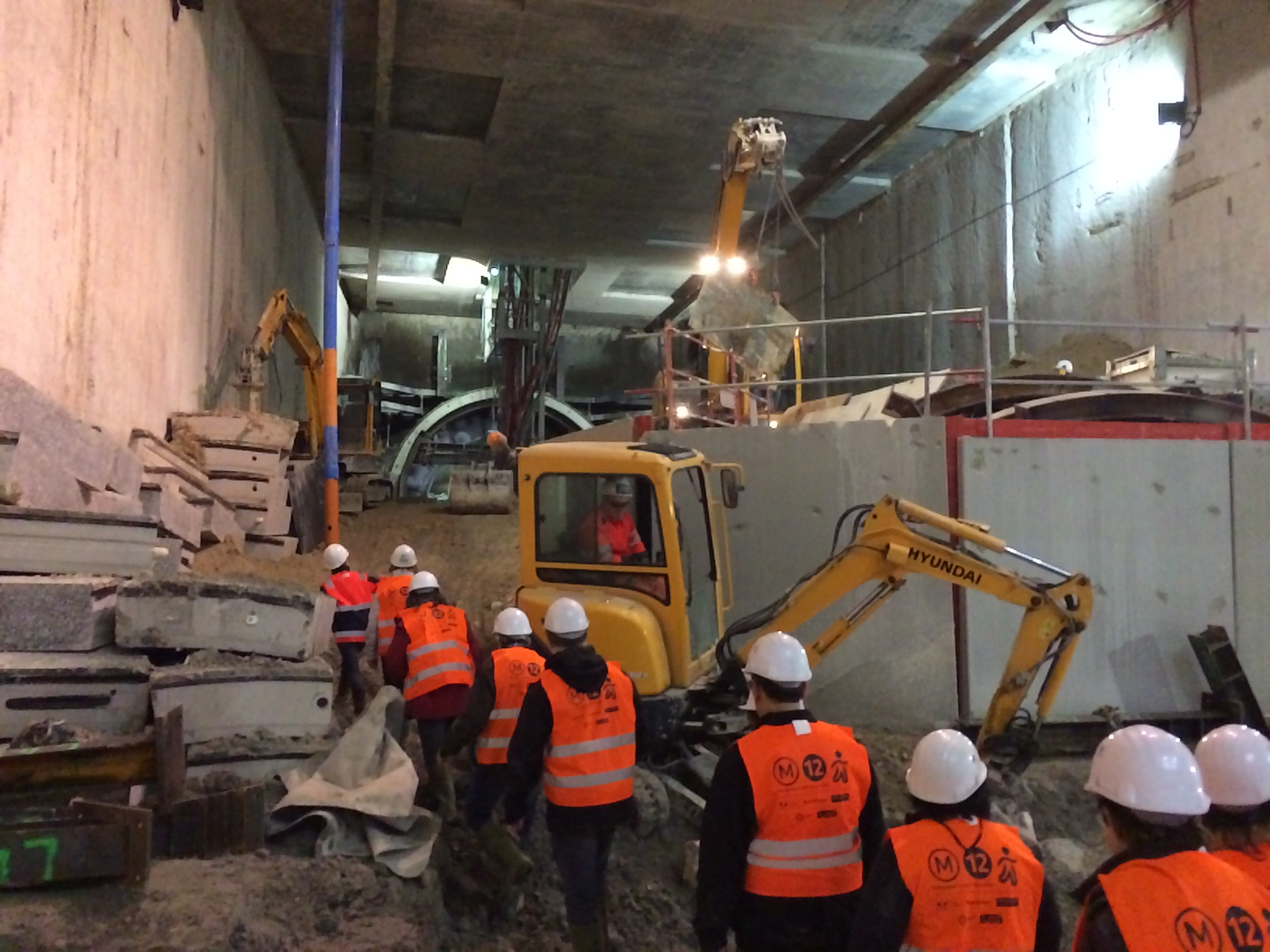 Chantier souterrain de la station de métro Aimé Césaire à Aubervilliers le 10 novembre 2017.